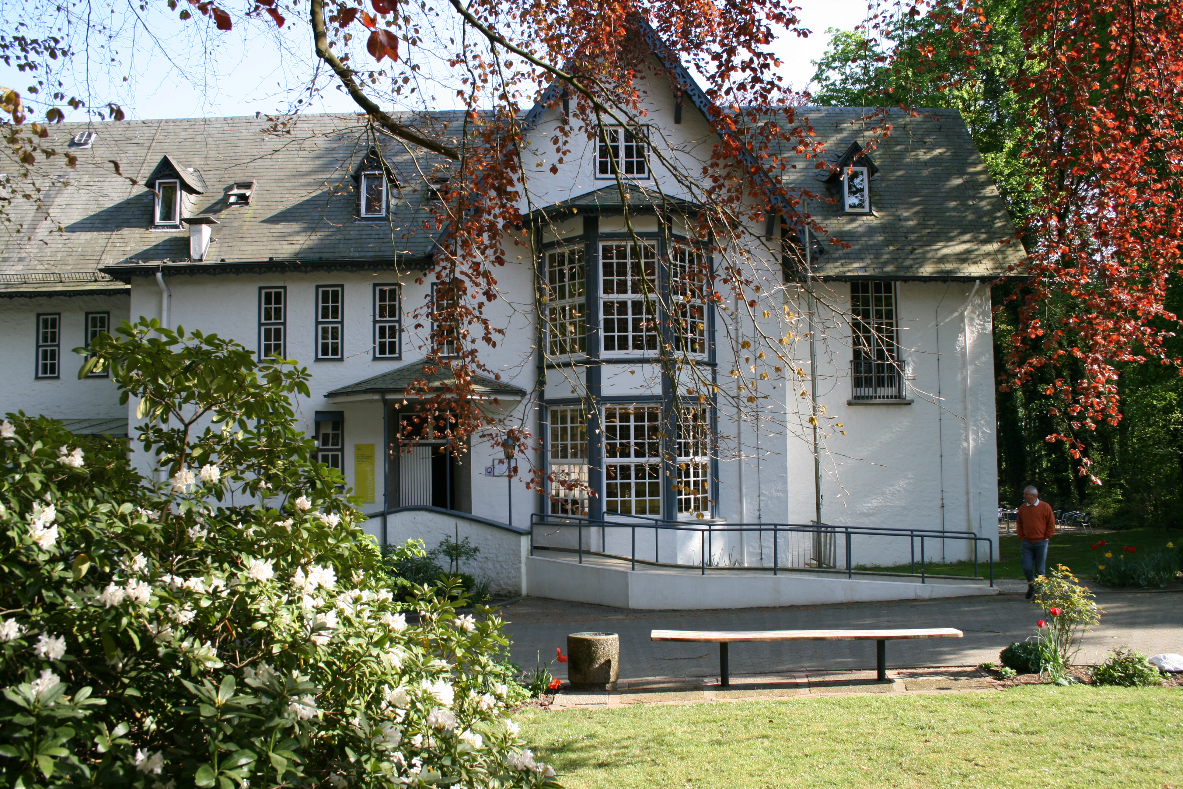 Das Tagungshaus Bredbeck - Bildungsstäte des Landkreises Osterholz - idyllisch gelegen am Rande des Teufelsmoors